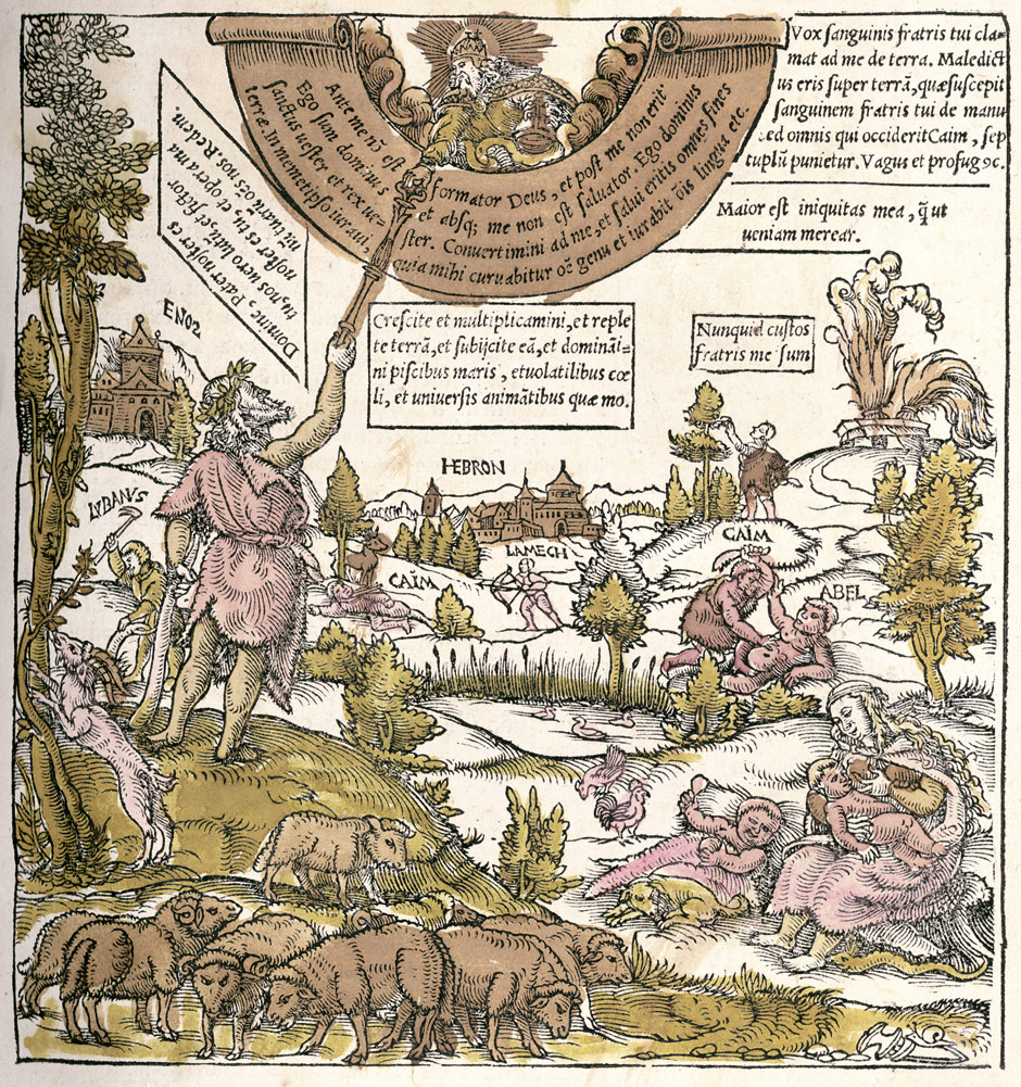 Woodcut from: Valerius A. Ryd: Catalogus annorum et principum geminus, ab Homine condito, usque in praesentem, a nato Christo, millesimum quingentesimum & quadragesimum annum deductus & continuatus, Bern, M. Apiarius, 1540